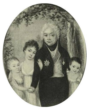 Алексей Григорьевич Спиридов с семьей